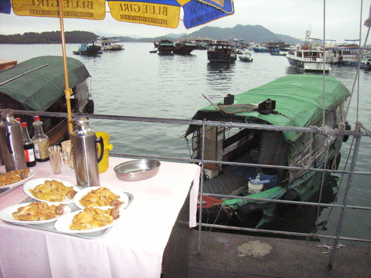 西貢市 西貢碼頭] (Sai Kung) 本身是一個漁村，漁民經常在此聚集，因而逐漸發展成一個著名的zh:海鮮勝地。今日西貢碼頭沿街都是這些擺賣海鮮的攤檔，並且有一些海鮮菜館。 (Photo by me.)